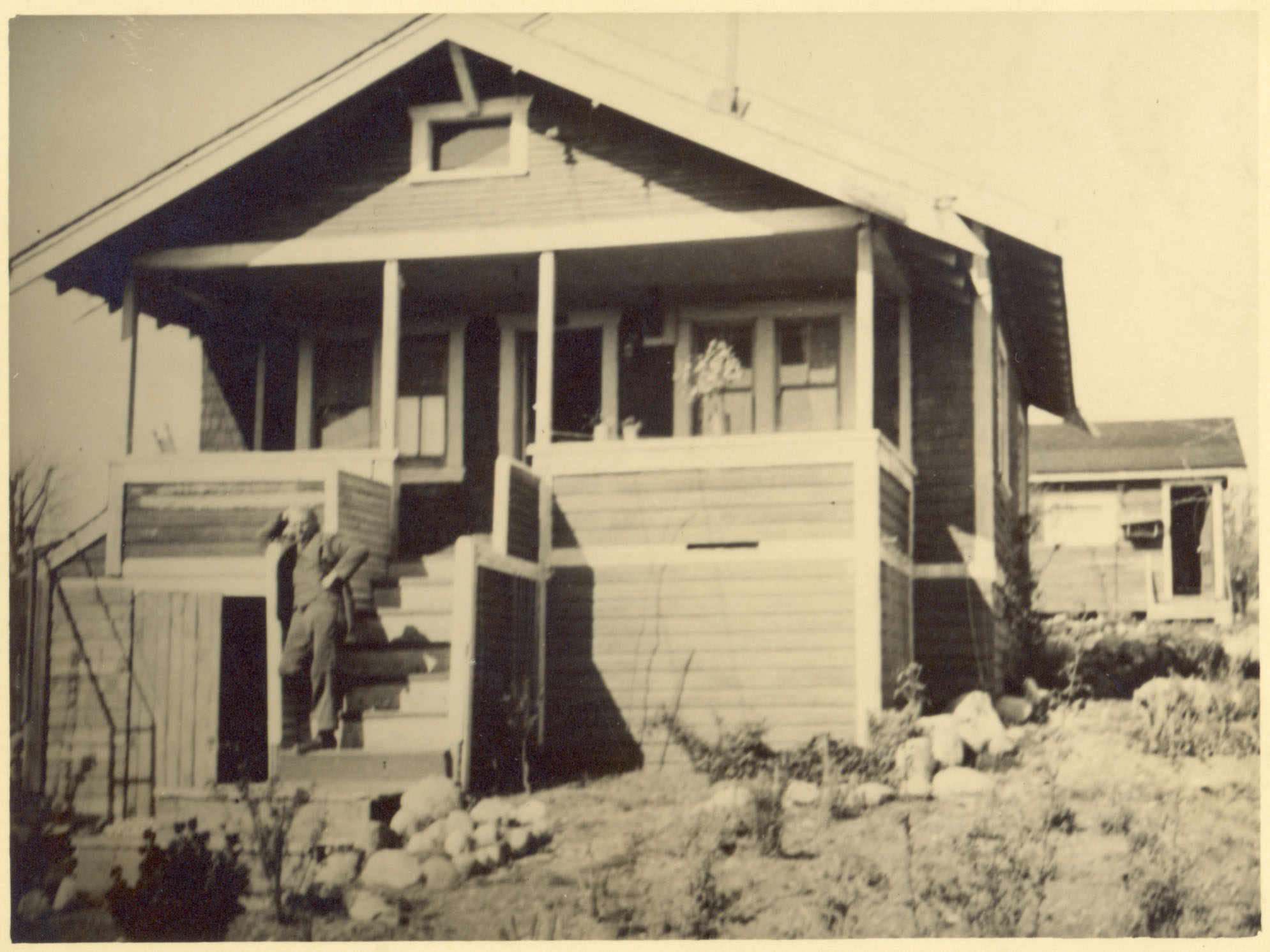 Holzhaus des Architekten Louis Löschner in Kanada